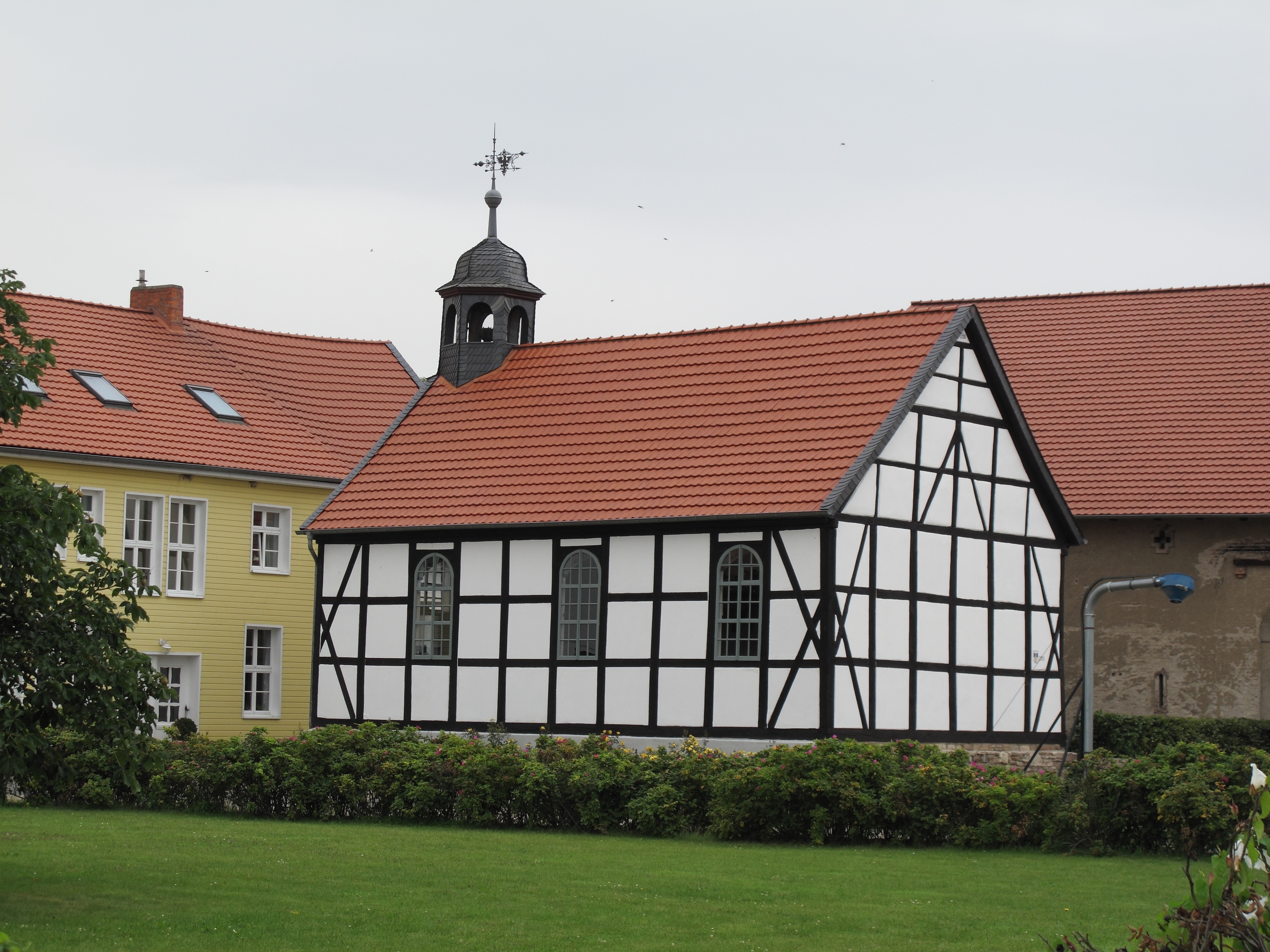 Fachwerkkirche